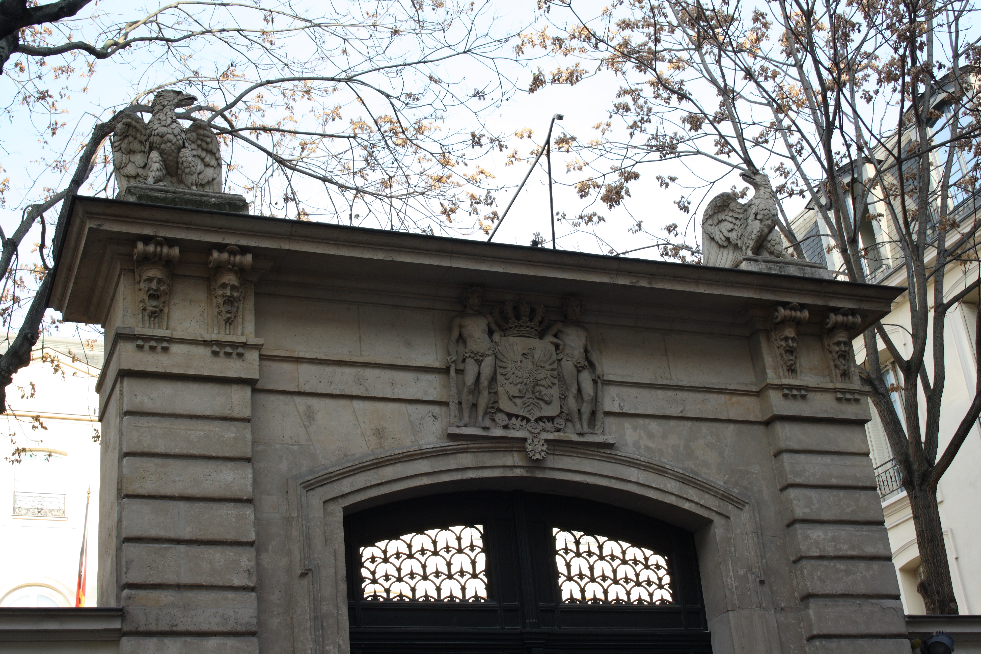 Palais Beauharnais in Paris (7. Arrondissement), 78 rue de Lille